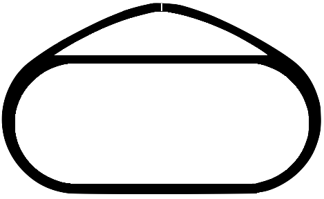 Mapa do Las Vegas Motor Speedway